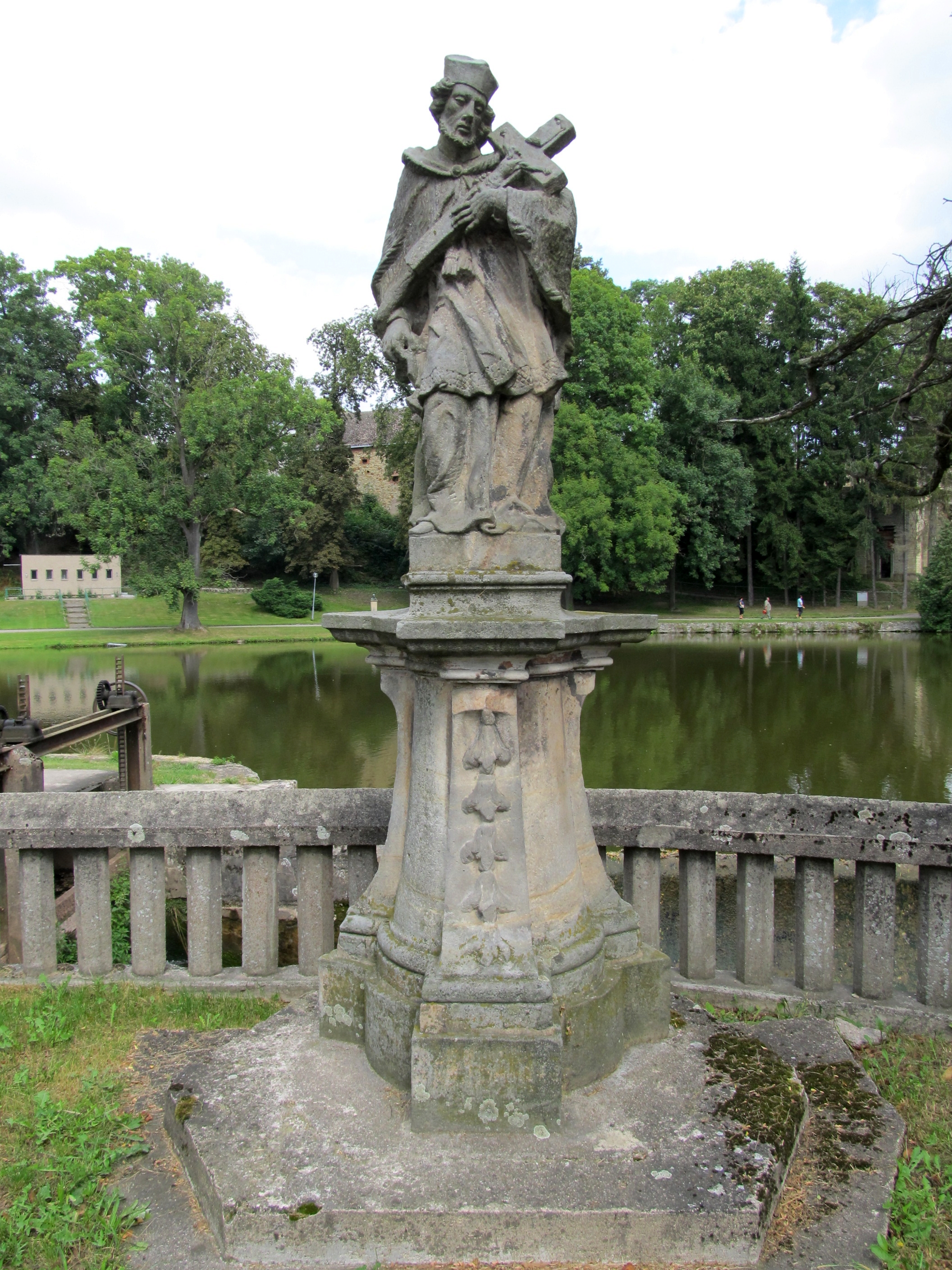 Socha sv. Jana Nepomuckého (Chvalkovice), u silnice před koupalištěm, Chvalkovice